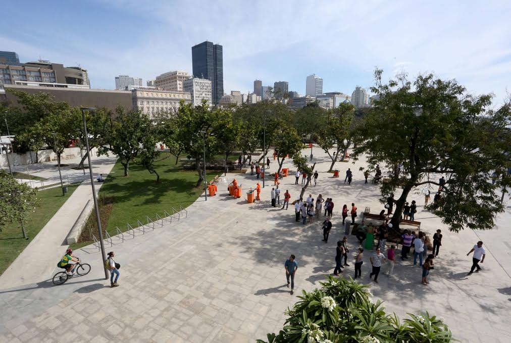 Urbanismo da Praça Marechal Âncora.